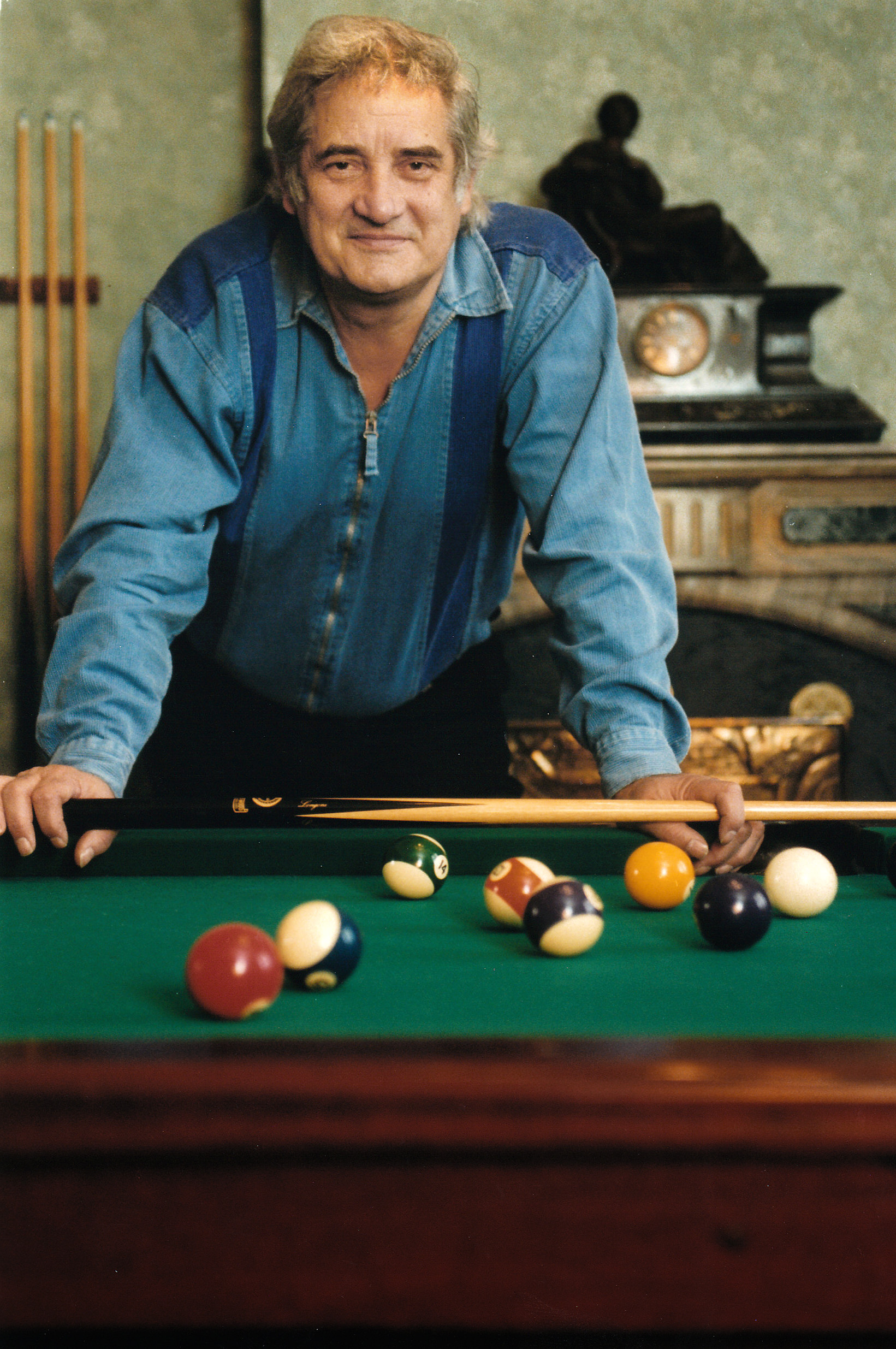 Paul Koeck, Vlaams schrijver ca. 2001